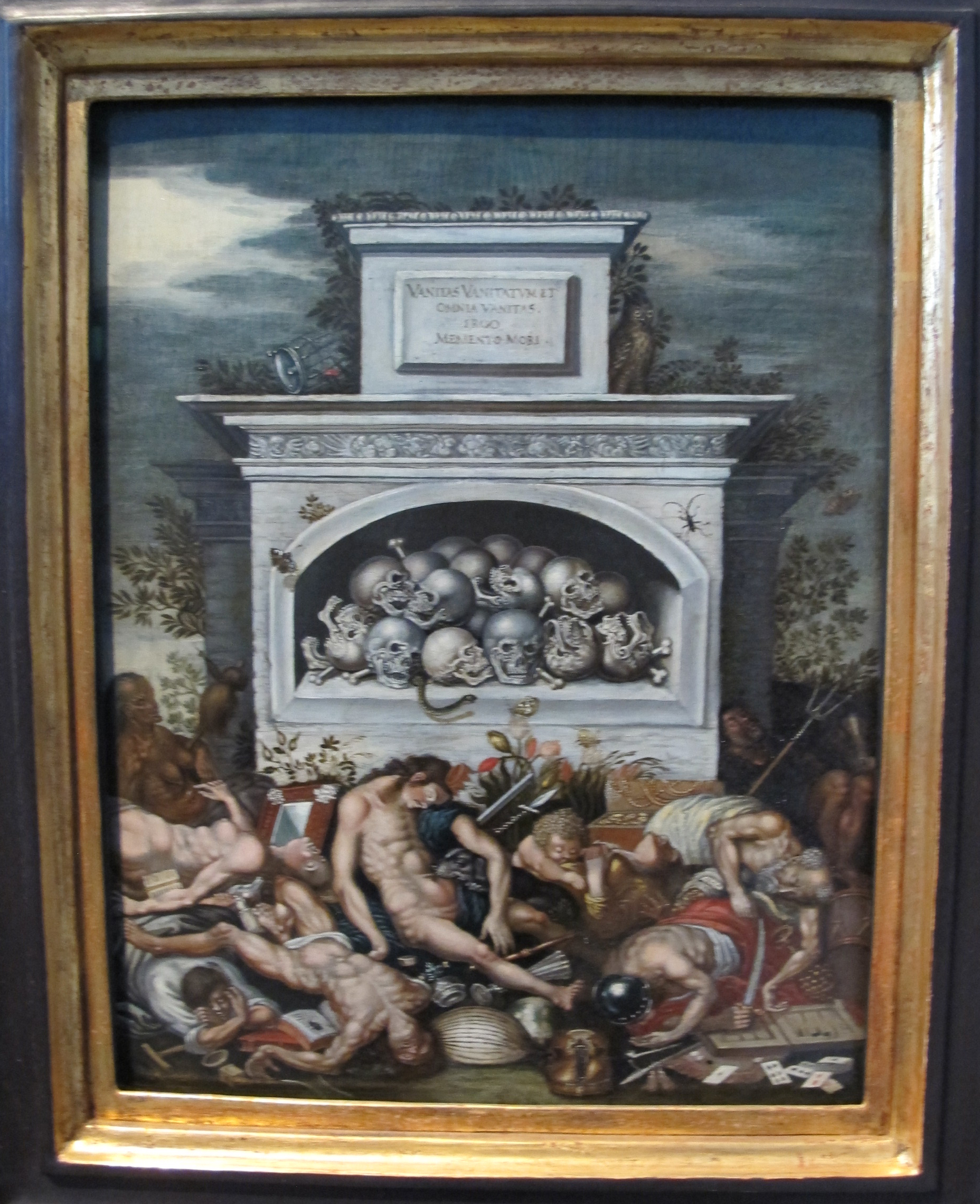 Valentin wagner, allegoria della vanità, dresda, 1652 ca.